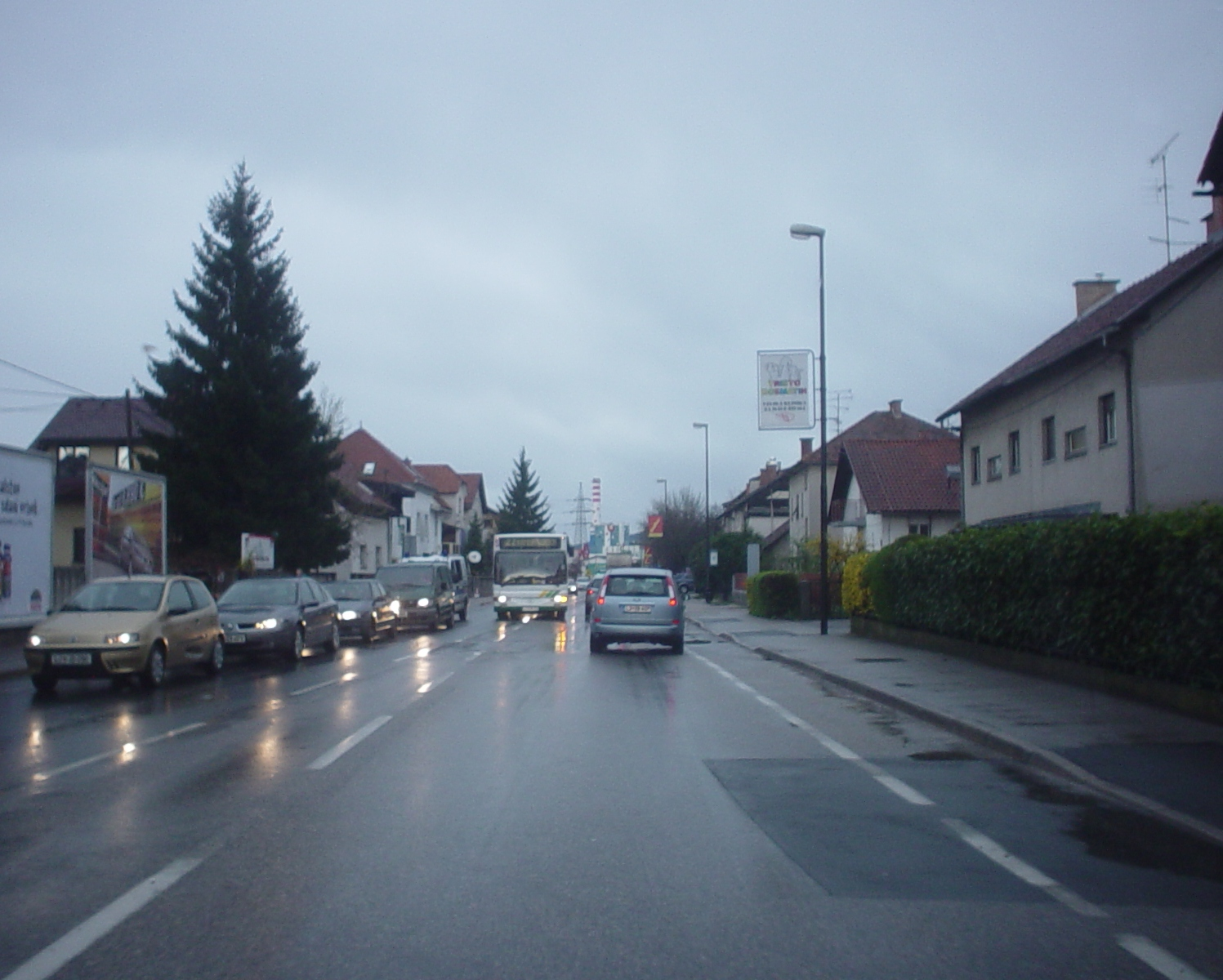 Kajuhova ulica v Ljubljani, Slovenija